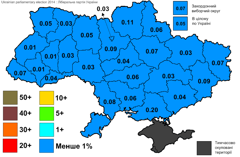 Результати виборів до Верховної Ради України, які відбулись 25 жовтня 2014 року. Інформація з офіційного сайту ЦВК. Ліберальна партія України.